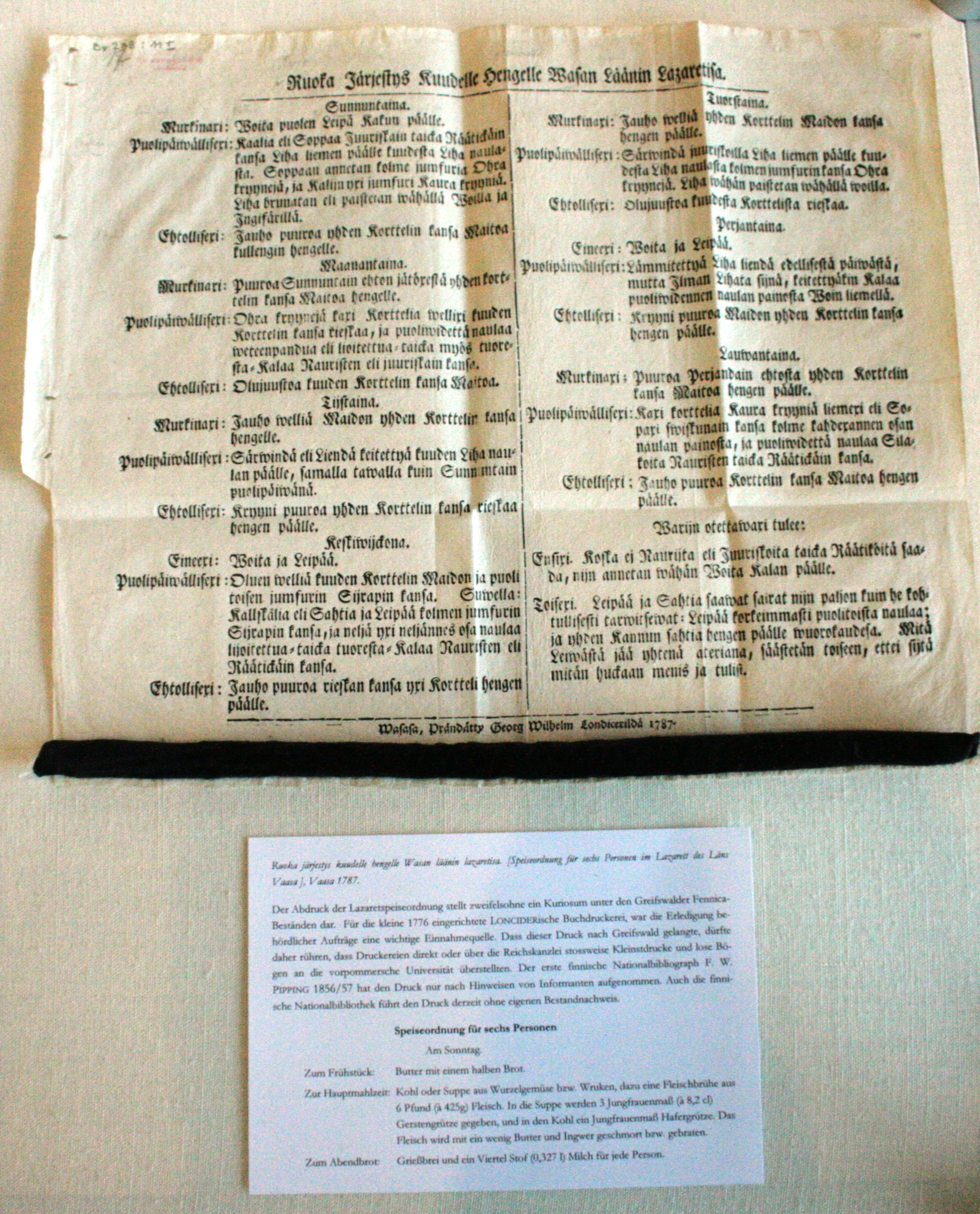 Ruoka järjestys kuudelle hengelle Wasan läänin lazaretisa. [Speise­ordnung für sechs Personen im Lazarett des Läns Vaasa ], Vaasa 1787. Der Abdruck der Lazaretspeiseordnung stellt zweifelsohne ein Kuriosum unter den Greifswalder Fennica-Be­ständen dar. Für die kleine 1776 eingerichtete Lonciderische Buchdruckerei, war die Erledigung be­hörd­licher Aufträge eine wichtige Einnahmequelle. Dass dieser Druck nach Greifswald gelangte, dürfte daher rühren, dass Druckereien direkt oder über die Reichskanzlei stossweise Kleinstdrucke und lose Bö­gen an die vorpommersche Universität überstellten. Der erste finnische Nationalbibliograph F. W. Pipping 1856/57 hat den Druck nur nach Hinweisen von Informanten auf­ge­nommen. Auch die fin­ni­sche Nationalbibliothek führt den Druck derzeit ohne eigenen Bestandnachweis. Speise­ordnung für sechs Personen Am Sonntag. Zum Frühstück: Butter mit einem halben Brot. Zur Hauptmahlzeit: Kohl oder Suppe aus Wurzelgemüse bzw. Wruken, dazu eine Fleischbrühe aus 6 Pfund (à 425g) Fleisch. In die Suppe werden 3 Jungfrauenmaß (à 8,2 cl) Gerstengrütze gegeben, und in den Kohl ein Jungfrauenmaß Hafergrütze. Das Fleisch wird mit ein wenig Butter und Ingwer geschmort bzw. gebraten. Zum Abendbrot: Grießbrei und ein Viertel Stof (0,327 l) Milch für jede Person.